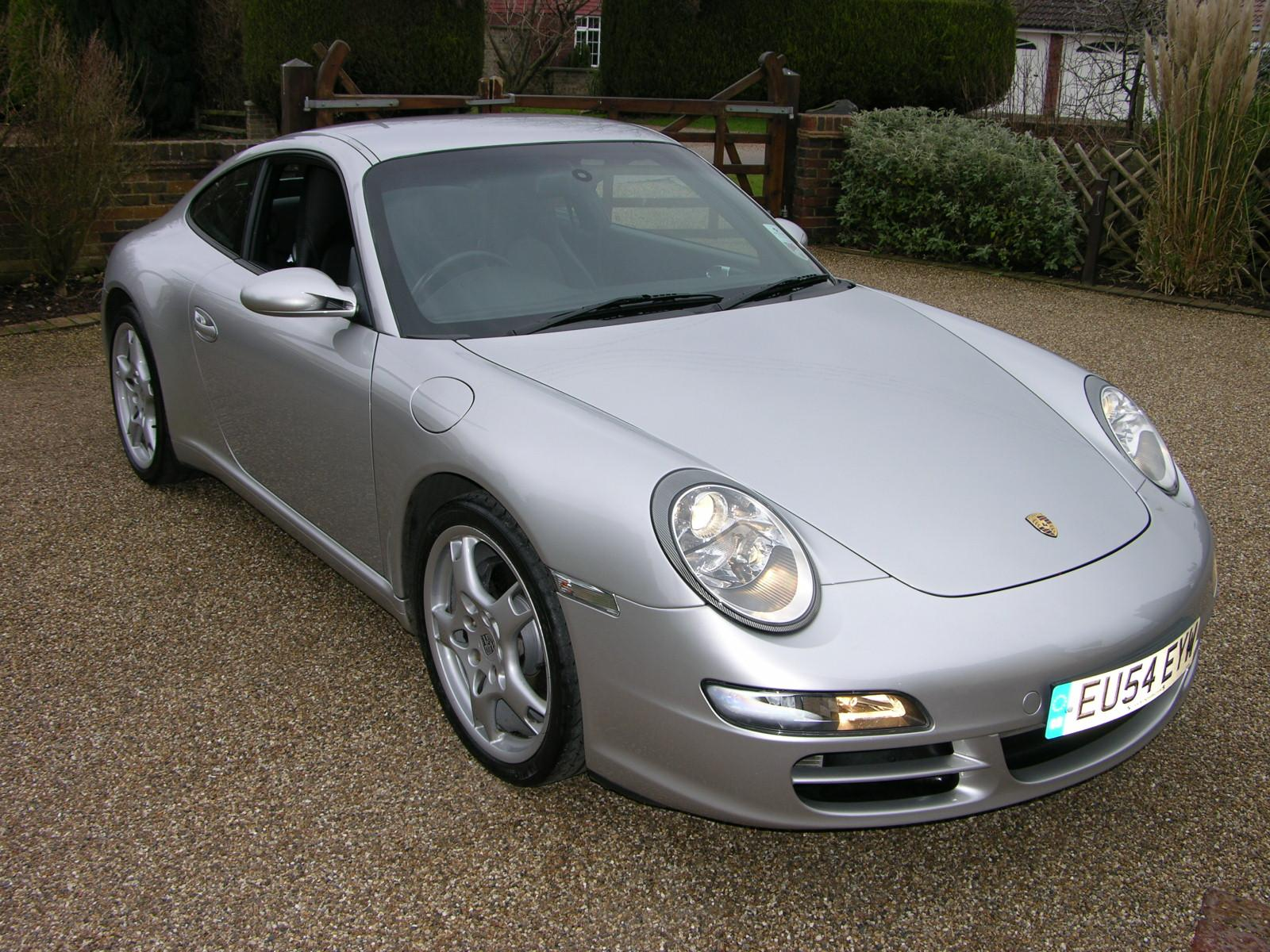 Porsche 911 (997) Carrera